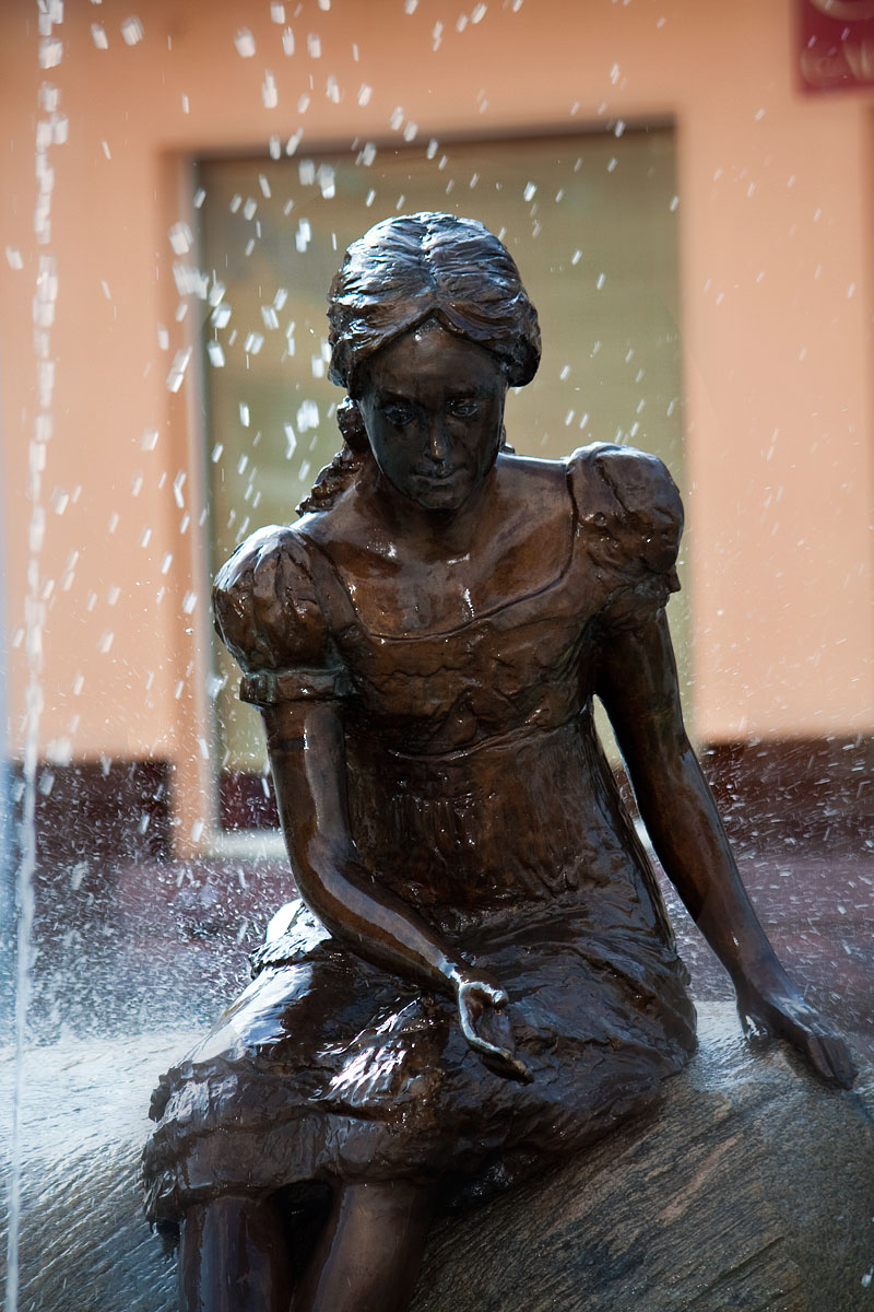 Fontanna położona w Sławie w woj. lubuskim.